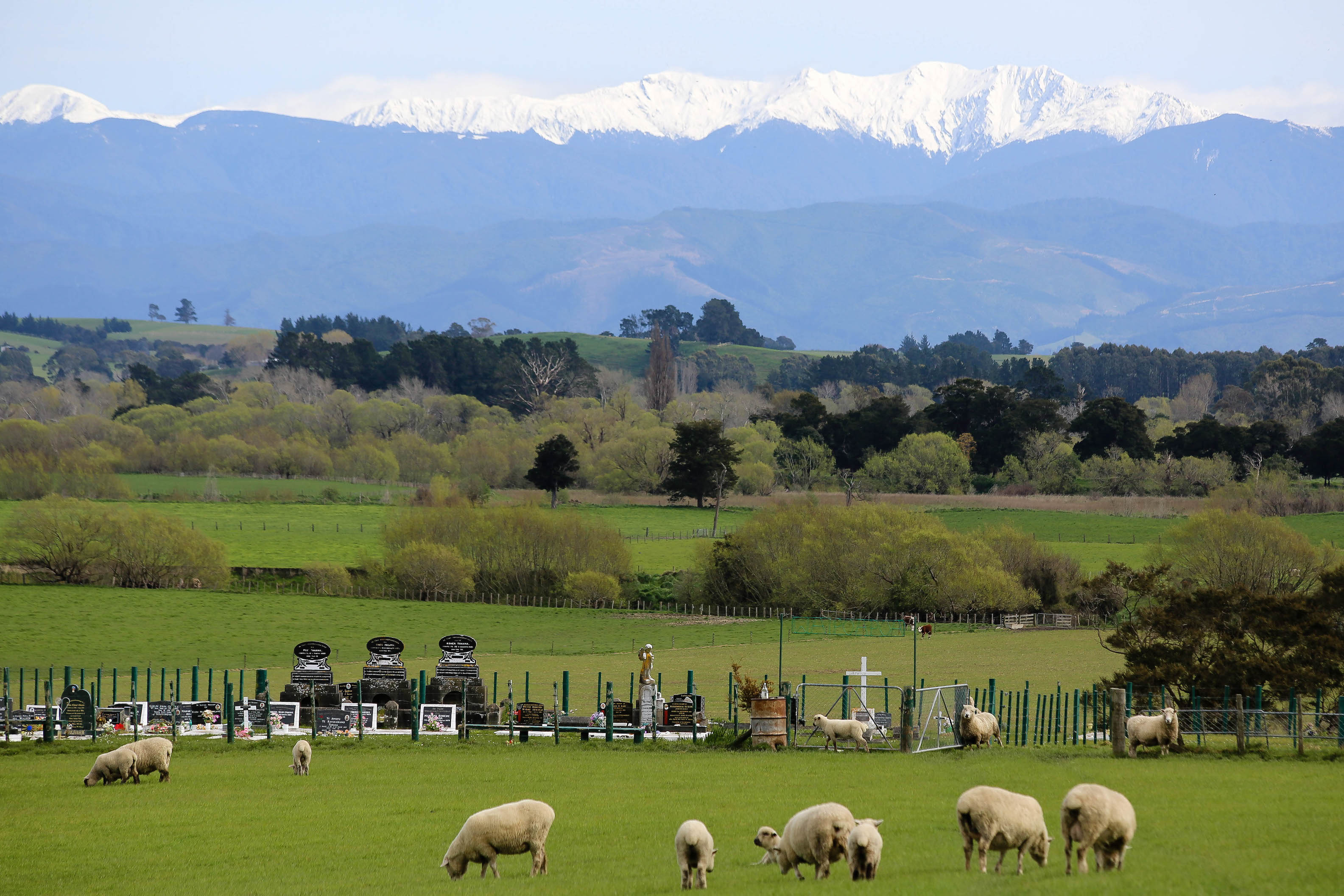 Tararuas from Wairarapa